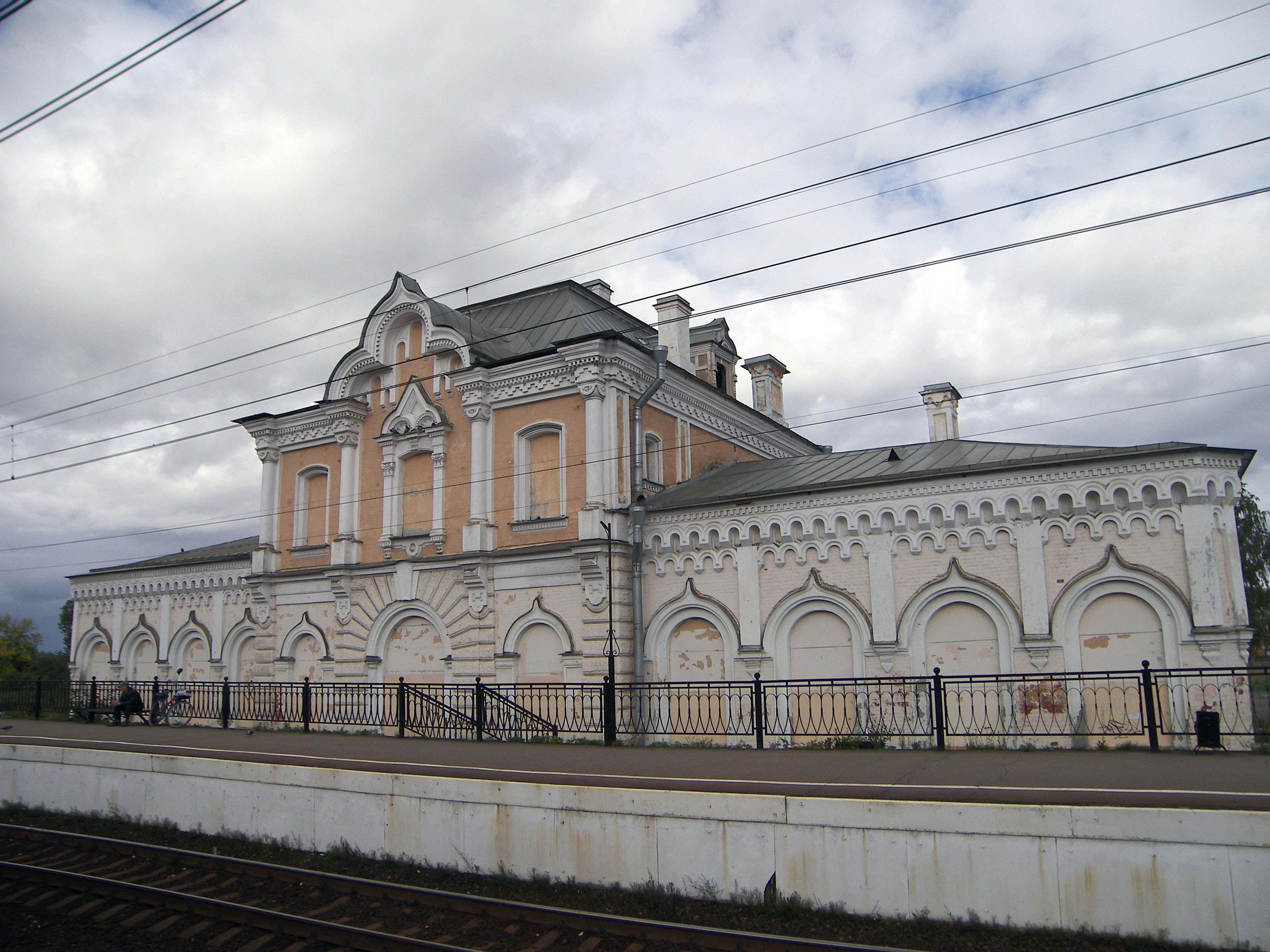 Здание вокзала железнодорожной станции Володарская, Санкт-Петербург